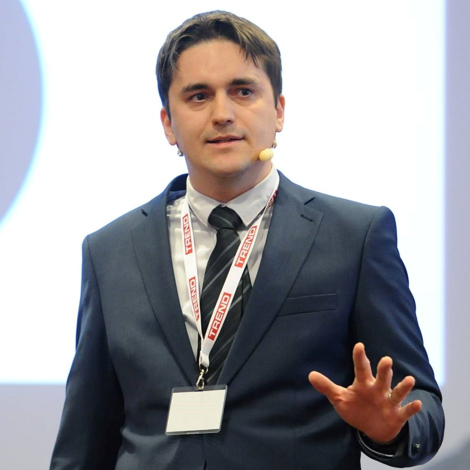 Martin Spano na konferencii Techtrendy 2019